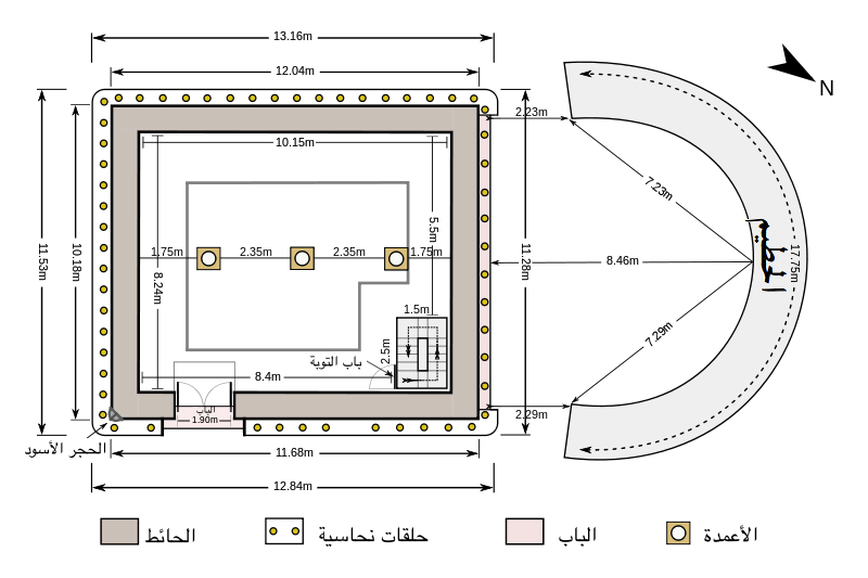 رسم تخطيطي لوصف أجزاء الكعبة.